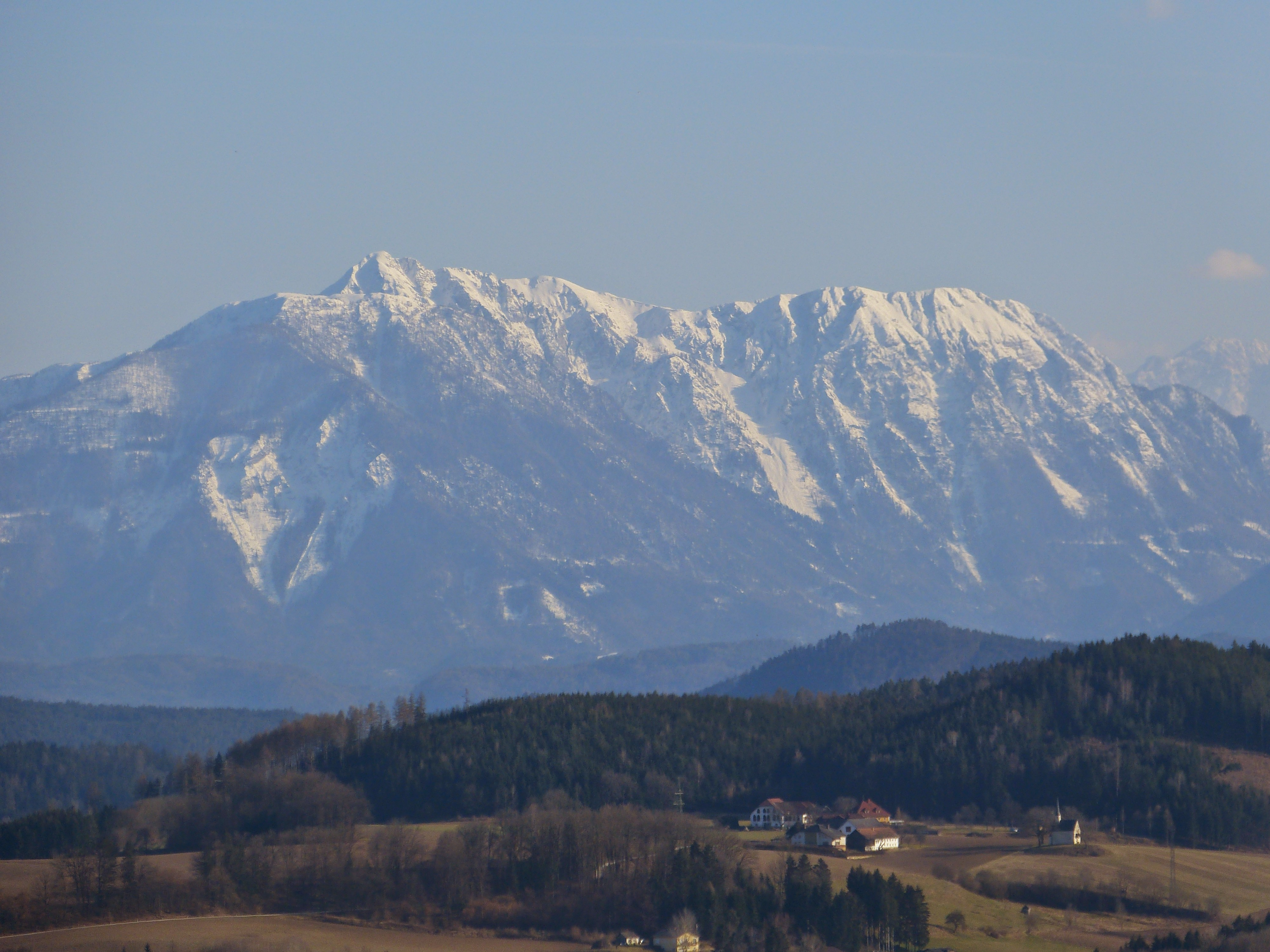 Vordergrund: Streimberg (Gemeinde St. Veit an der Glan), Hintergrund: Obir. Kärnten